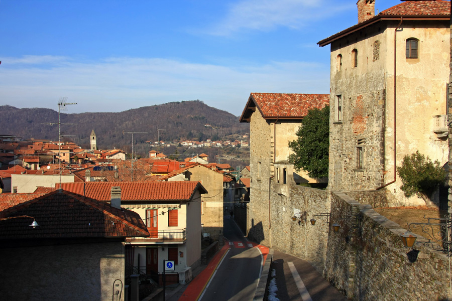 Veduta di Massino Visconti (NO), a destra il castello, a sinistra l'abitato; sullo sfondo il campanile romanico pendente